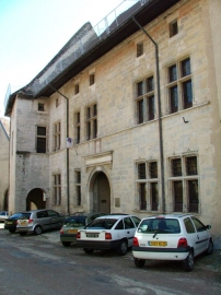 Hôtel de Santans